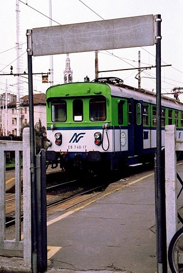 L'elettromotrice EB 740 fa capolino alla vecchia stazione di Novara Nord in uno degli ultimi giorni di esercizio.